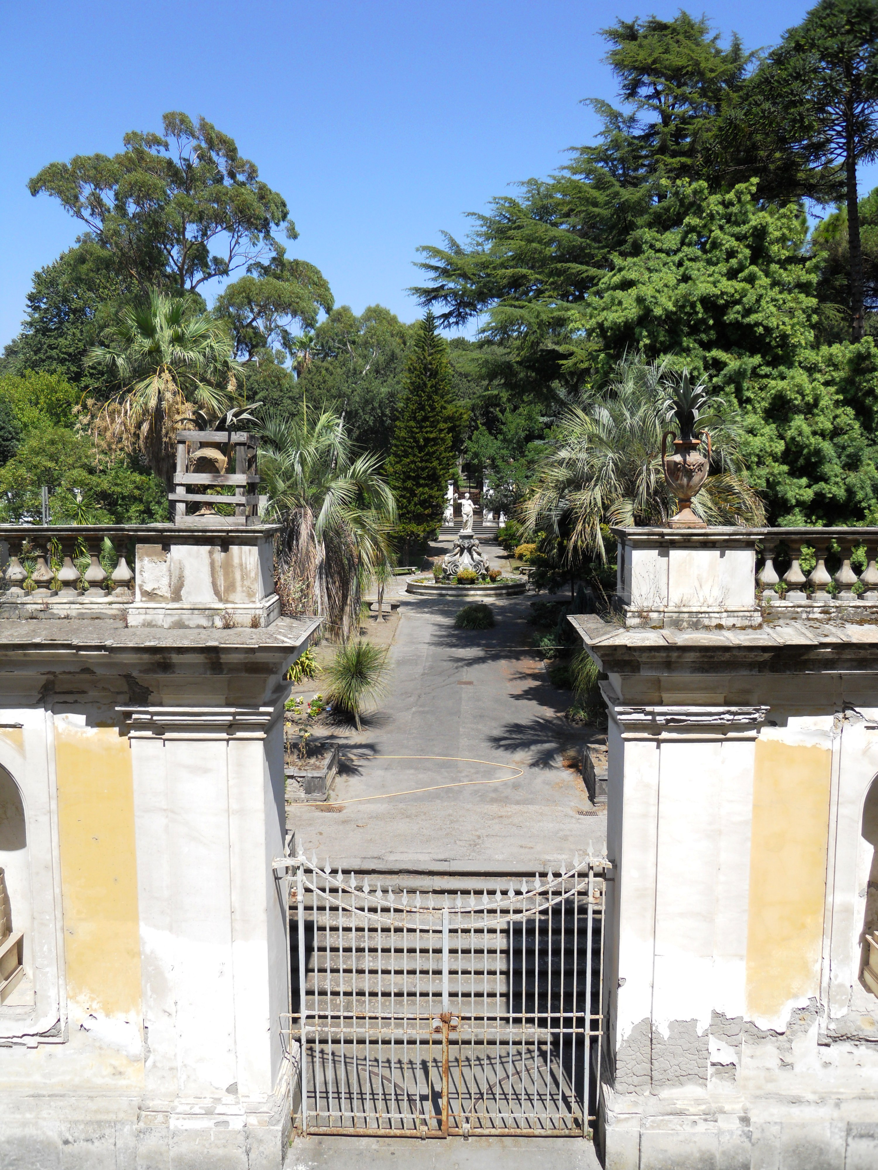 Reggia di Portici - giardino